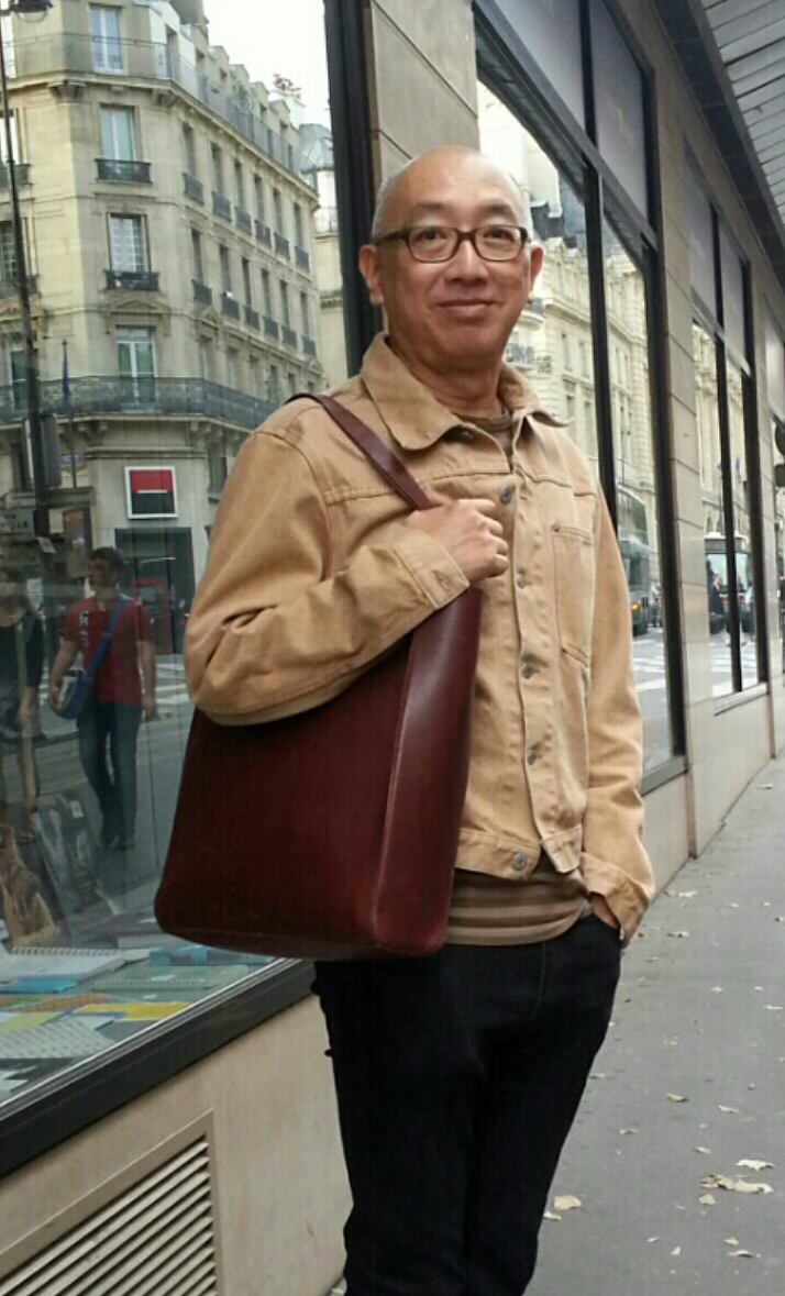 中文（香港）: 作者 邁克先生